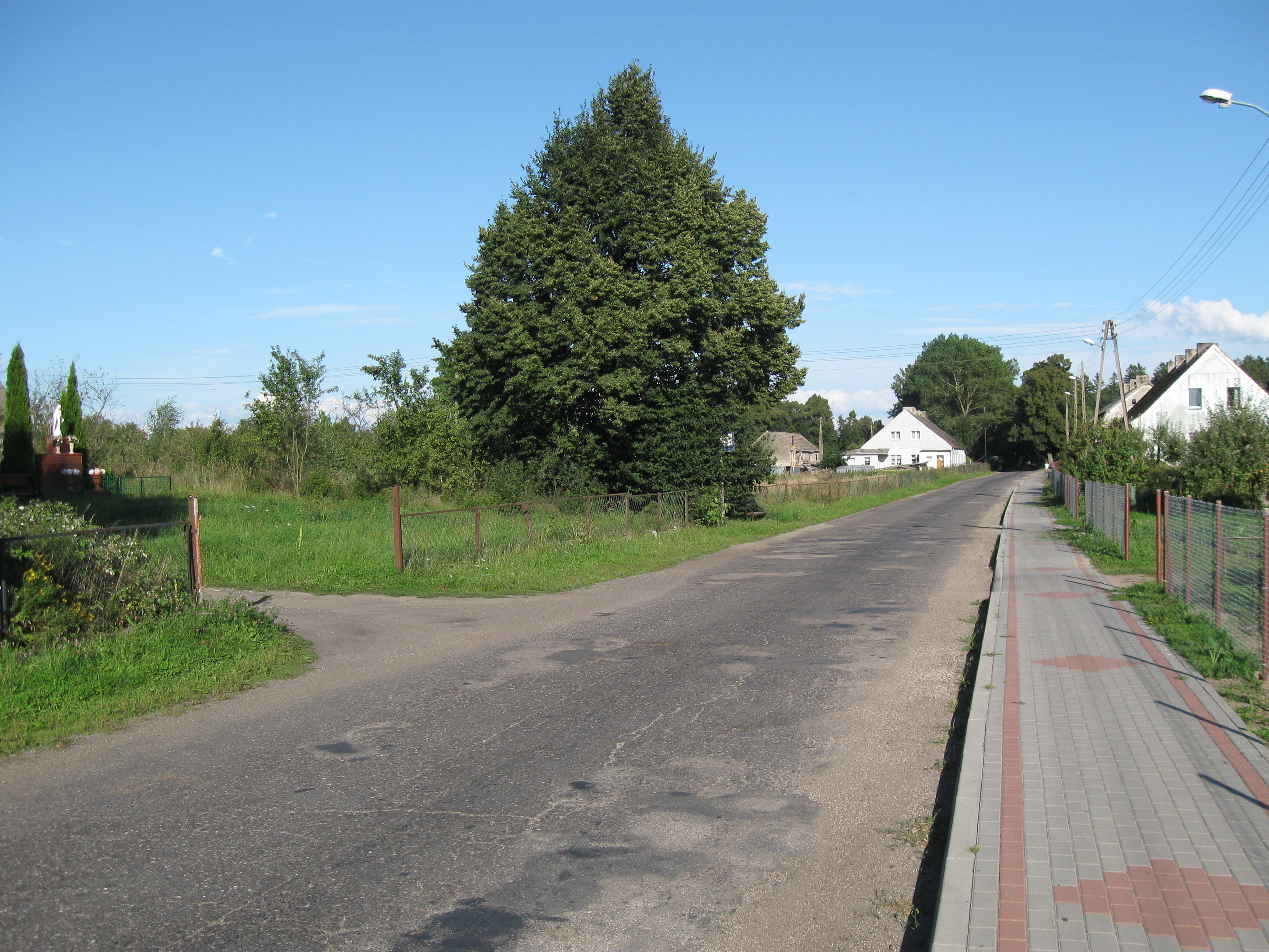 Mołstowo - centrum i wyjazd w kierunku Dargosławia